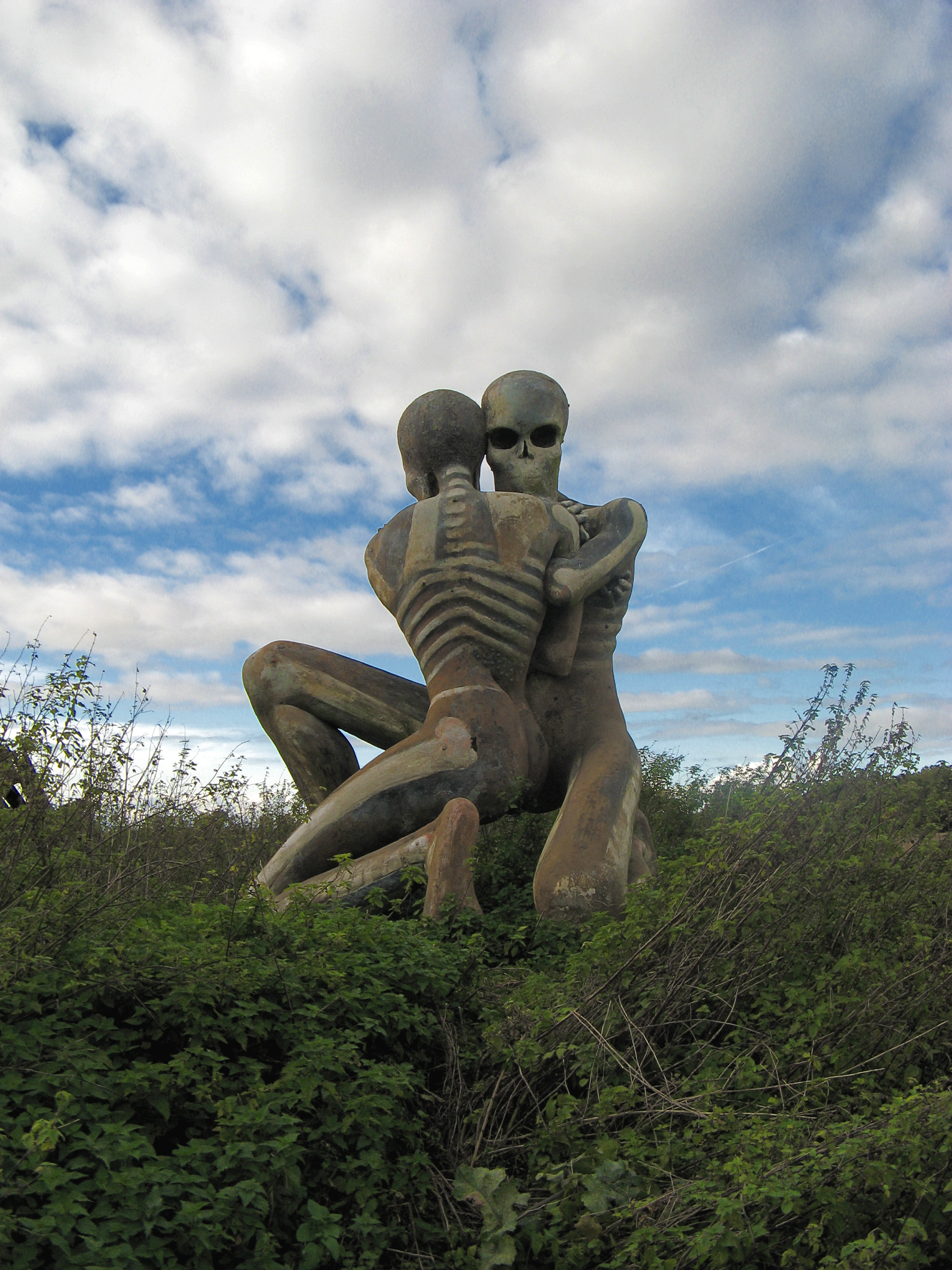 Checkendon Skeletons